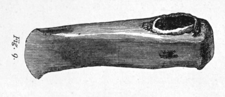 Ungarische Schaftlochaxt des Äneolithikums